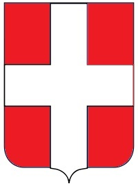 Novara stemma comunale